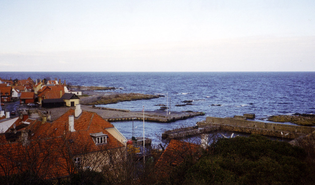 Hafen von Gudhjem - Kleinstadt im Norden von Bornholm originally uploaded on de.wikipedia by Benutzer:Darkone at 23:46, 7. Nov 2004. Filename was Gudhjem Hafen.jpg.